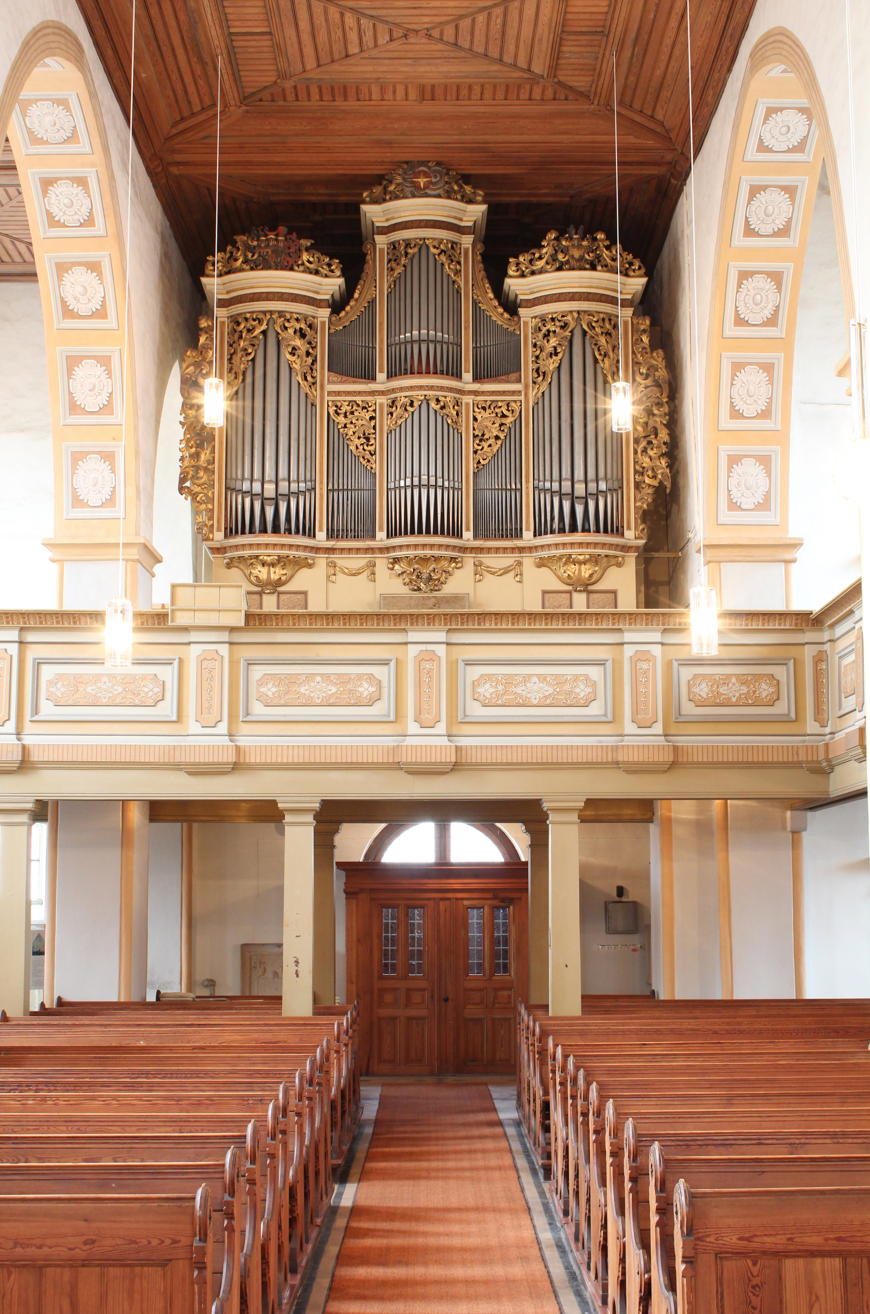 한국어 (조선): 뢰타 게오르겐교회 질버만오르간 1721년 제작